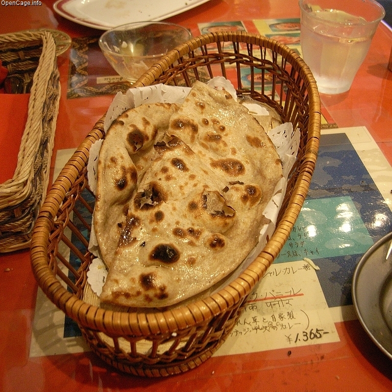 ロティ（Roti）